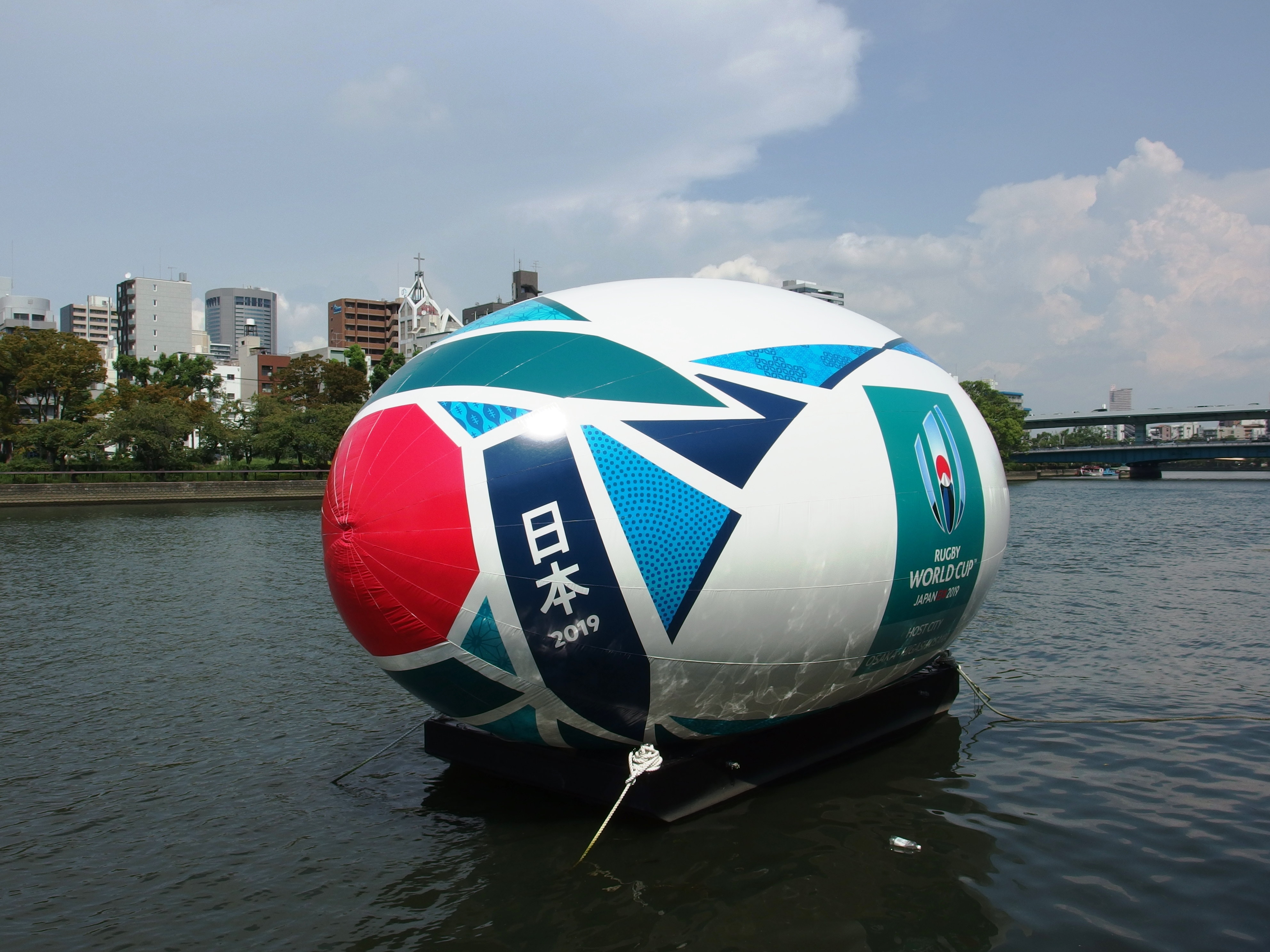 大阪市の八軒家船着場。